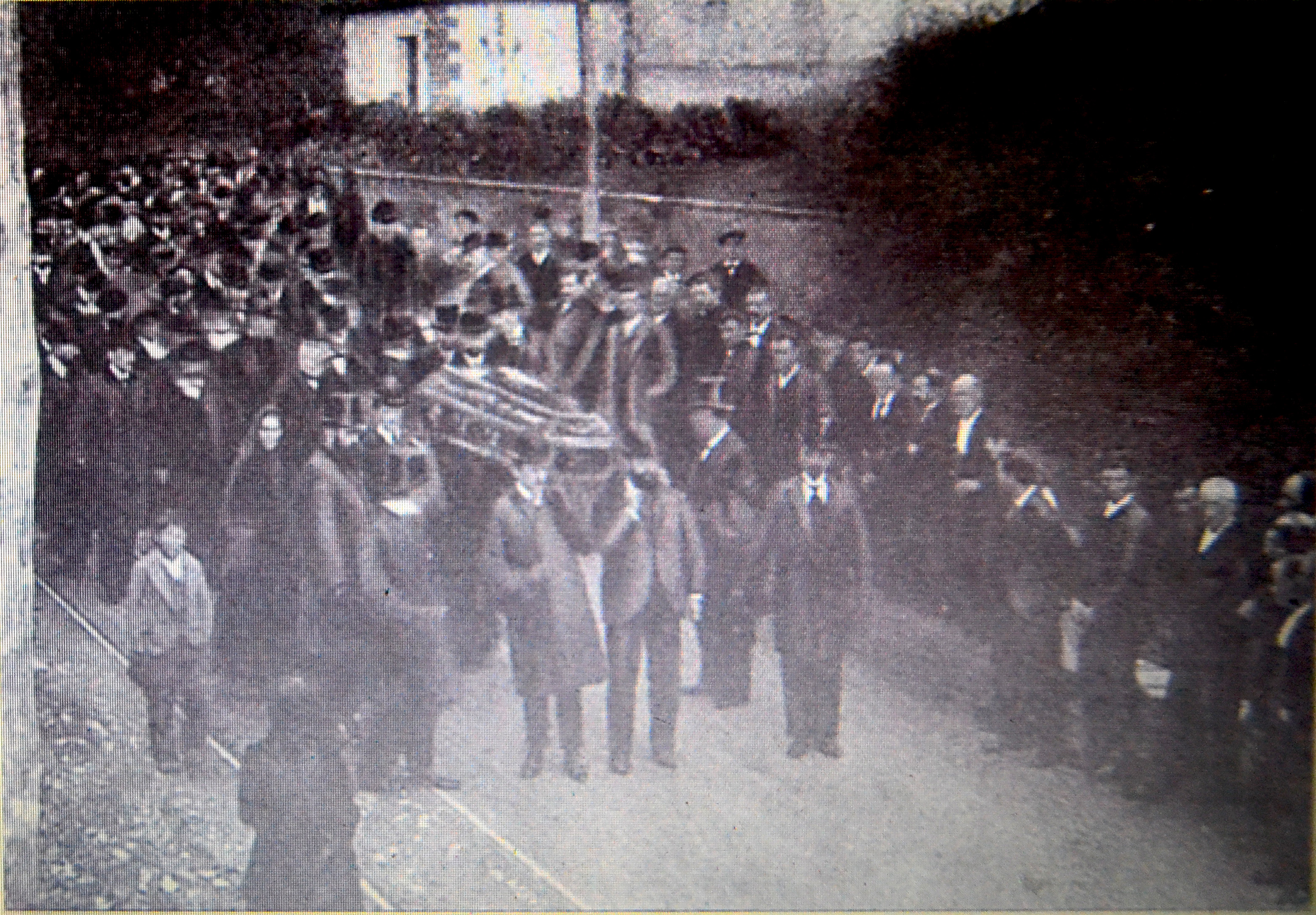 Sabin Aranaren hileta, Sukarrieta, 1903. Bizkaia, Euskal Herria. Funeral of Sabino Arana, Sukarrieta, 1903. Biscay, Basque Country